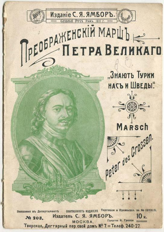 Преображенский марш Петра великого. Ноты